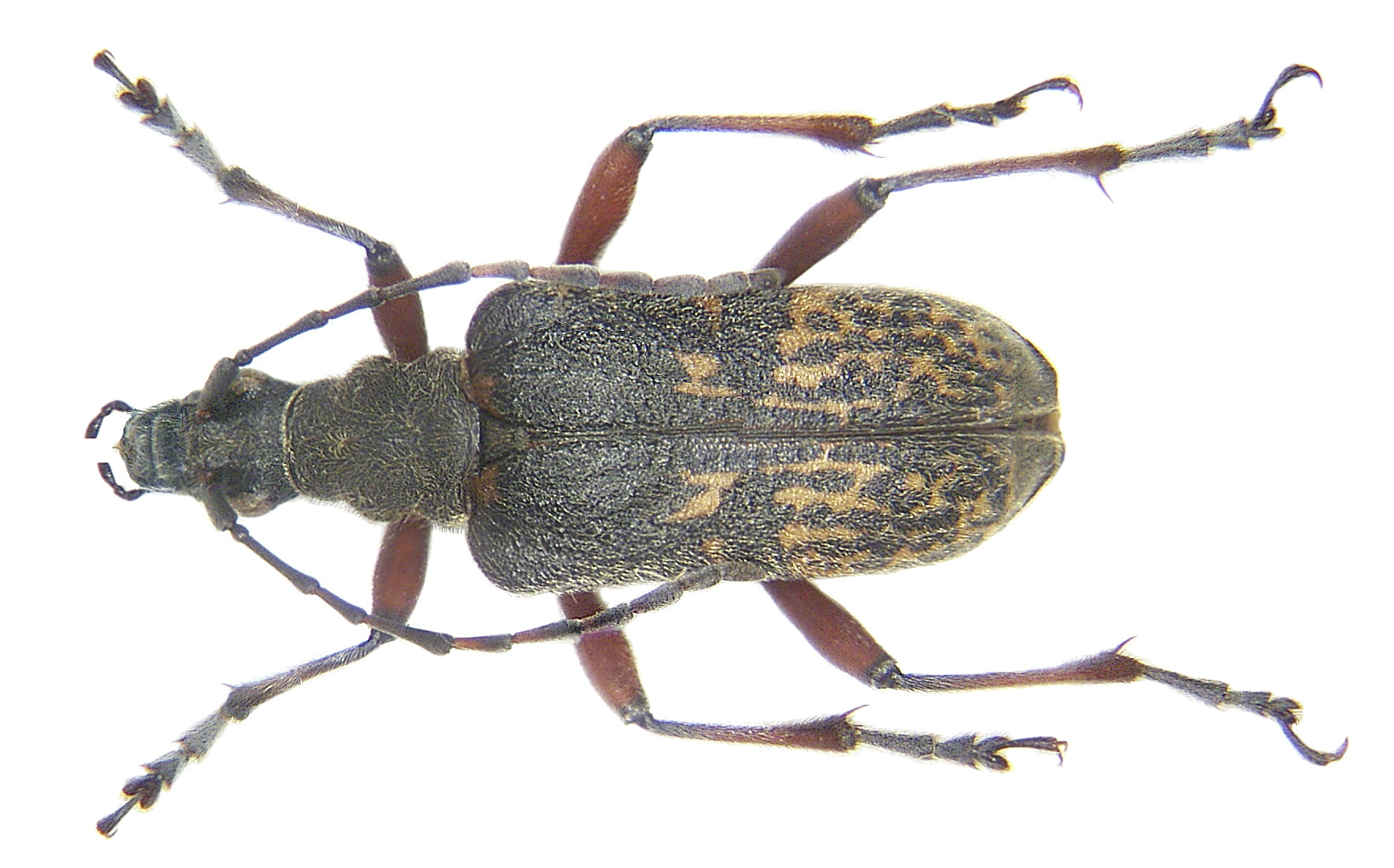 Familie: Cerambycidae Grösse: 10-12 mm Verbreitung: Europa Ökologie: montan, Entwicklung ungeklärt Fundort: Germania, Oberfranken, Nordhalben leg. det. U.Schmidt, 1981 Foto: U.Schmidt, 2006